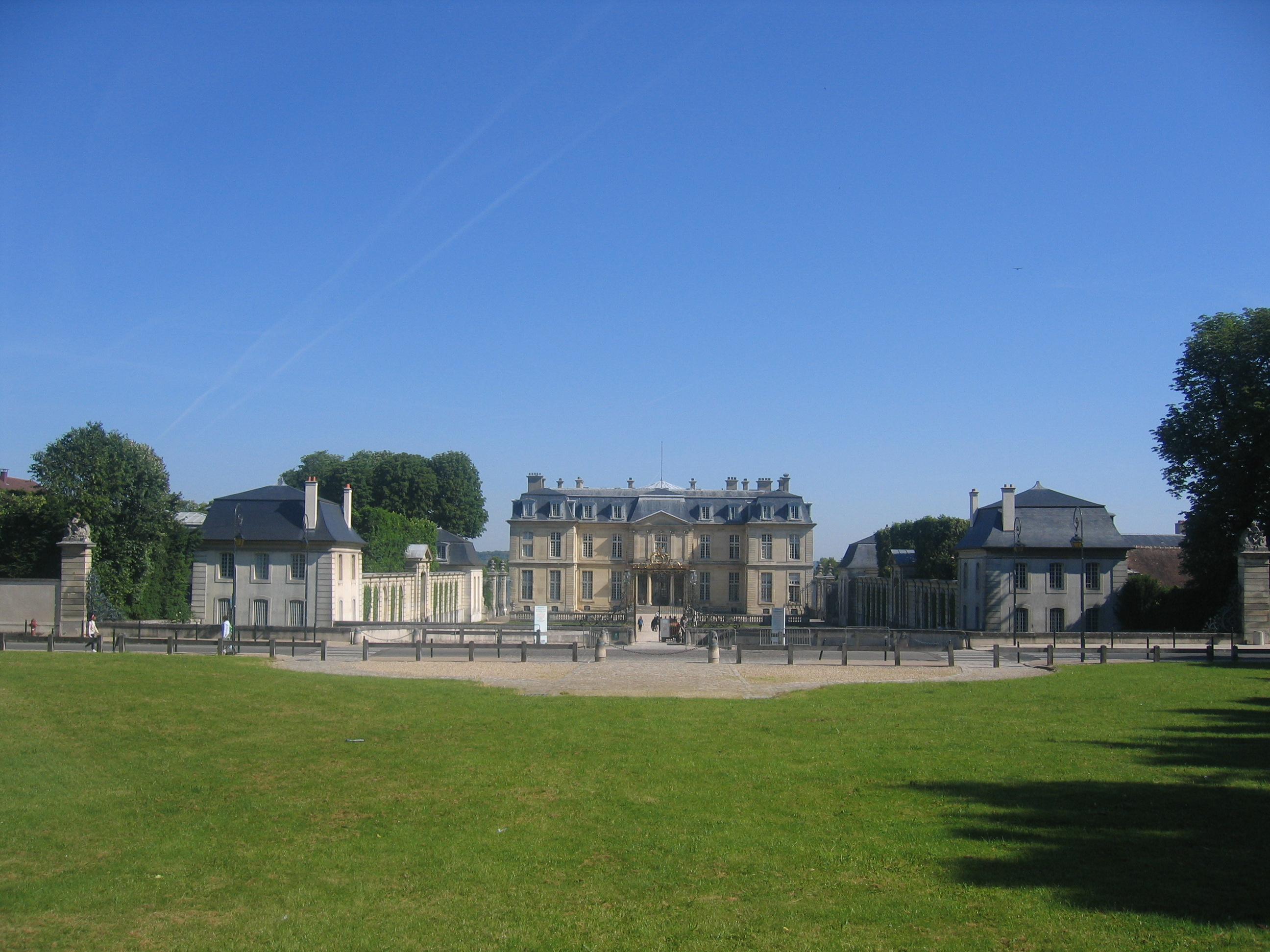 Plan large du Château de Champs-sur-Marne (France).